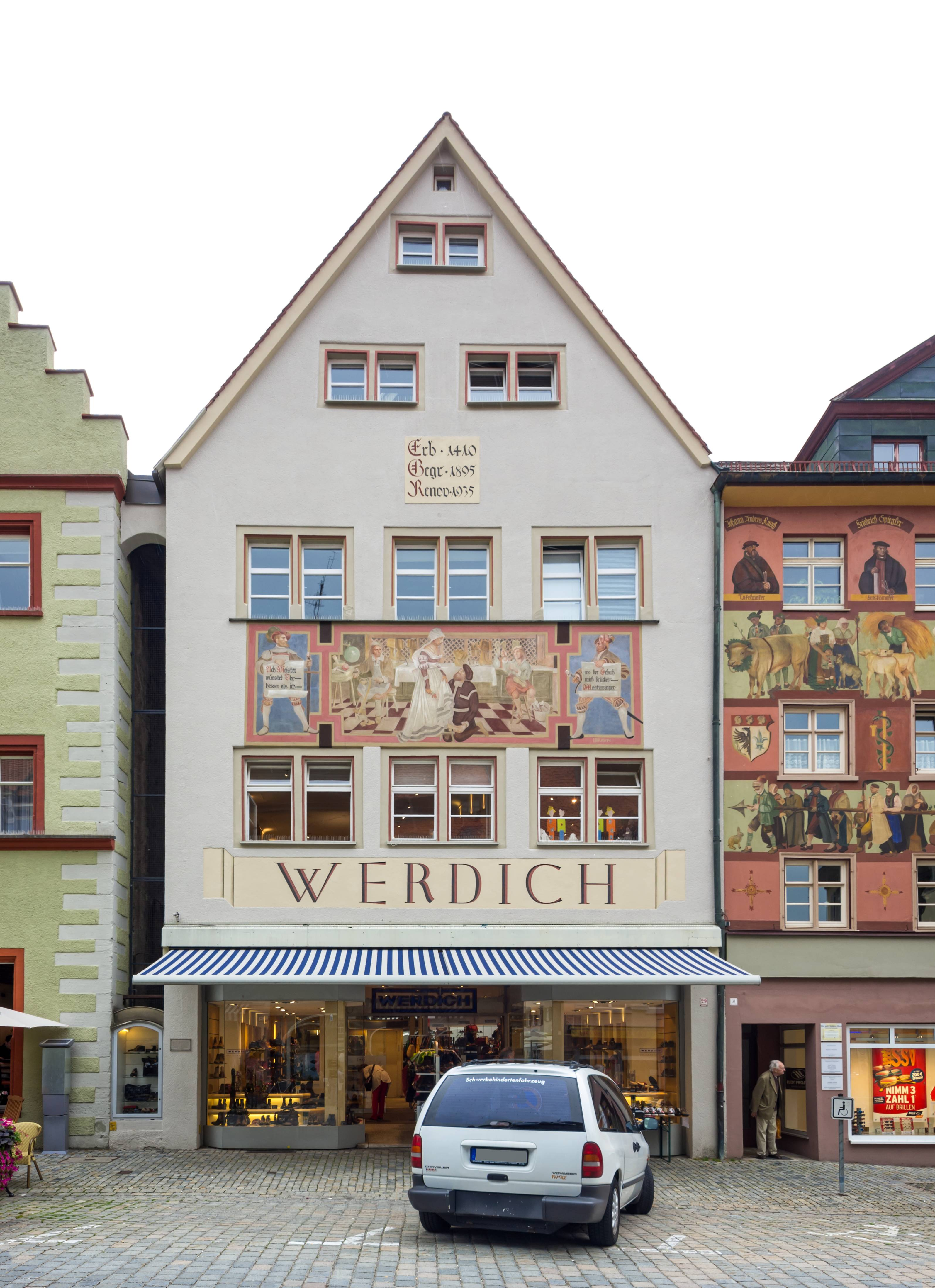 Bilder aus Wangen im Allgäu